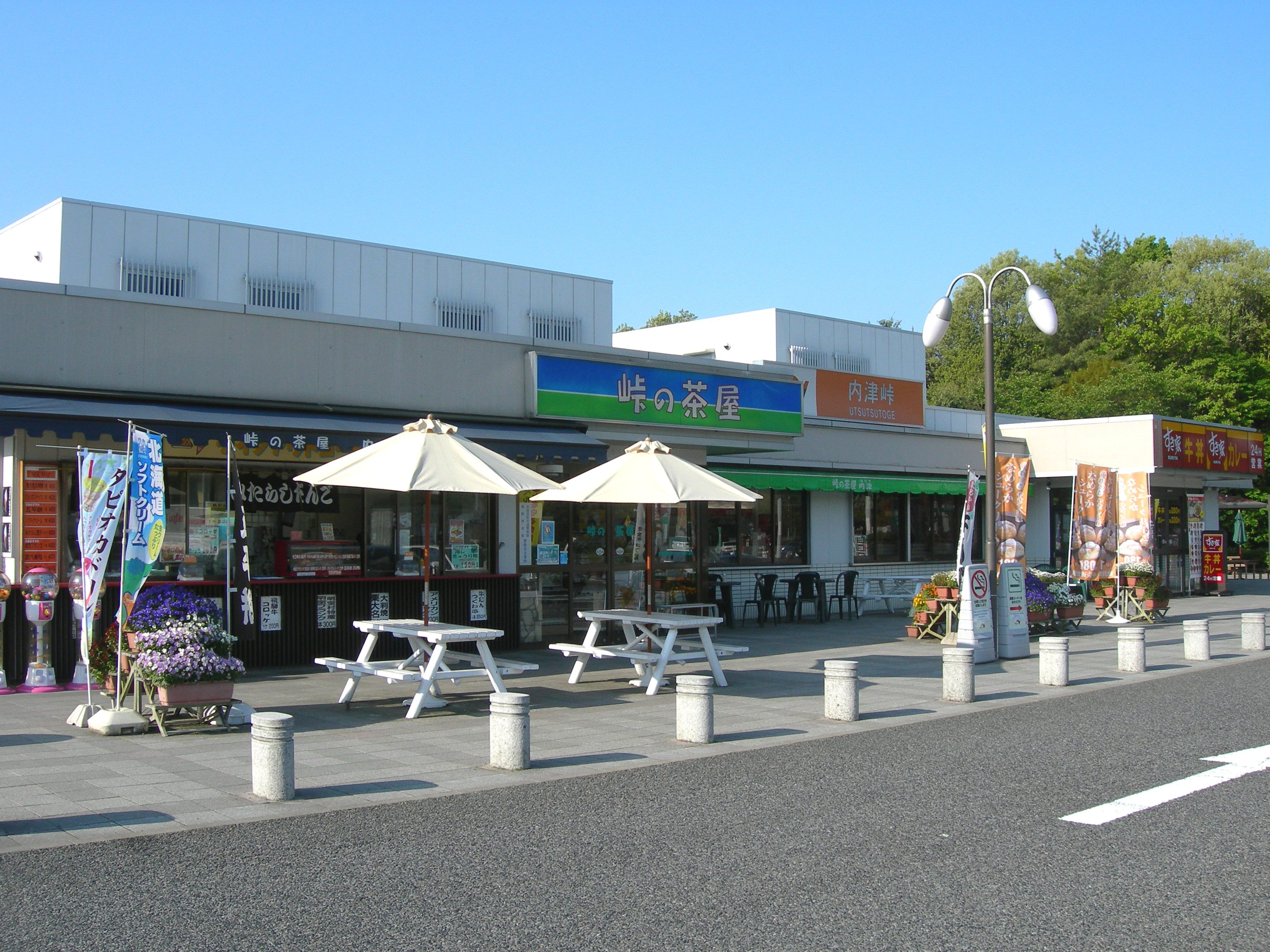 内津峠パーキングエリア 下り線施設